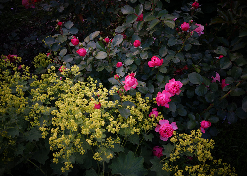 Alchemilla mollis, Rosa 'Leonardo da Vinci'